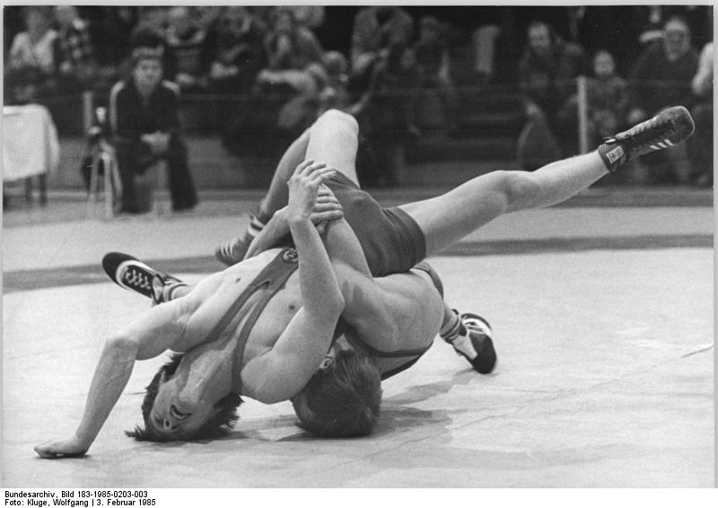 Rüdiger Wachs, Ralf Keller ADN-ZB Kluge 3.2.85 Leipzig: DDR-Meisterschaften im Ringen - Klassischer Stil Im Fliegengewichtsfinale gewann der Titelverteidiger Rüdiger Wachs vom SC Leipzig (oben) gegen Ralf Keller (ASK).